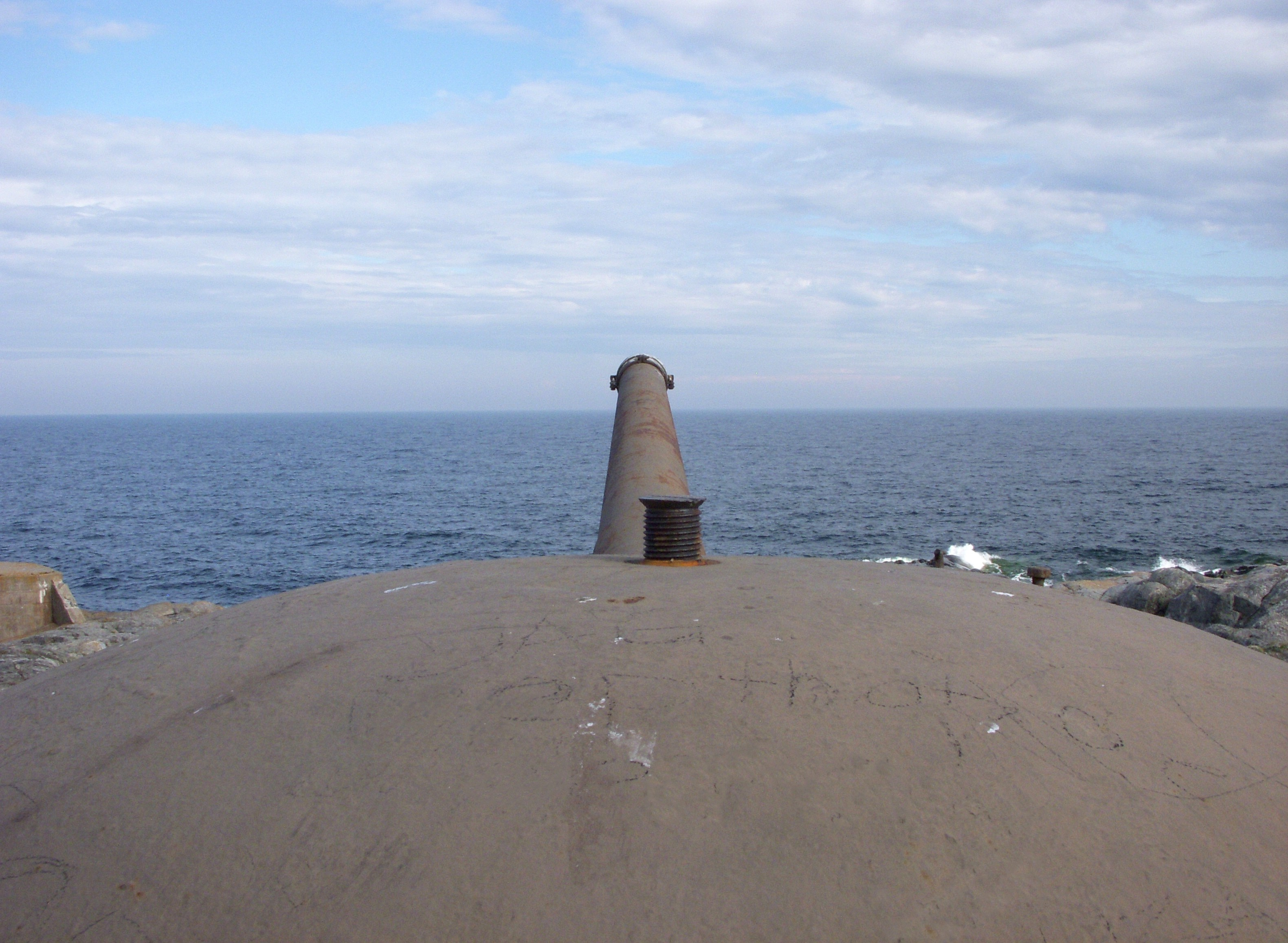 15,2 cm batteriet, Landsort, pjäs 1